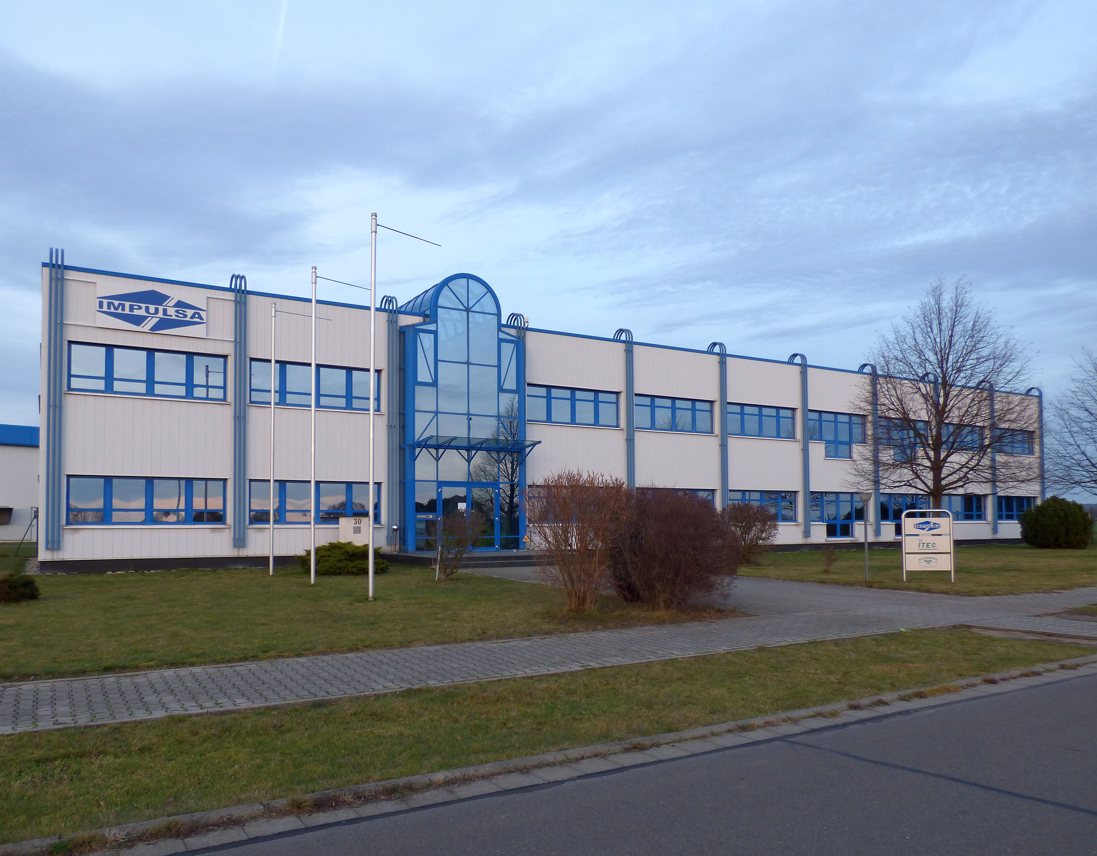 Impulsa-Bürogebäude Elsterwerda